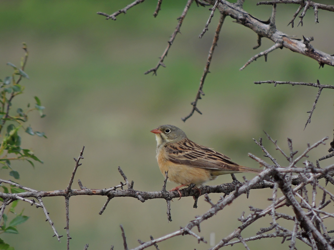 Srpski naziv vinogradska strnadica Opis vrste D.t. 15-16,5 cm. Gnezdi se u većem delu južne i istočne Evrope, manjem delu centralne Evrope, u Maloj Aziji, na Kavkazu i u delu centralne Azije. Selica je. Zimu provodi u podsaharskoj Africi. Naseljava mozaična staništa u kojima se nalaze livade, stepe i pašnjaci sa živicama, šumarcima ili pojedinačnim drvećem i žbunjem, kao i mozaična poljoprivredna područja u ravnicama, pobrđu i na nižim planinama. Gnezda gradi blizu tla, sakrivena u žbunastoj vegetaciji. Hrani se semnjem biljaka, insektima i drugim beskičmenjacima. Populacija u Evropi naglo opada zbog nestanka staništa usled intenziviranja poljoprivrede. U Srbiji je redovna gnezdarica pobrđa u većem delu zemlje, čija se populacija procenjuje 6.000-8.000 gnezdećih parova (Puzović et al 2009). Status zaštite vrste IUCN crvena lista - Kategorija LC; Direktiva o pticama EU - Annex I; Ptice od posebnog značaja za zaštitu u Evropi: SPEC 2; Konvencija o očuvanju evropske divlje flore i faune i prirodnih staništa - Annex III; Pravilnik o proglašenju i zaštiti strogo zaštićenih i zaštićenih divljih vrsta biljaka, životinja i gljiva: Prilog I Strogo zaštićene divlje vrste biljaka, životinja i gljiva